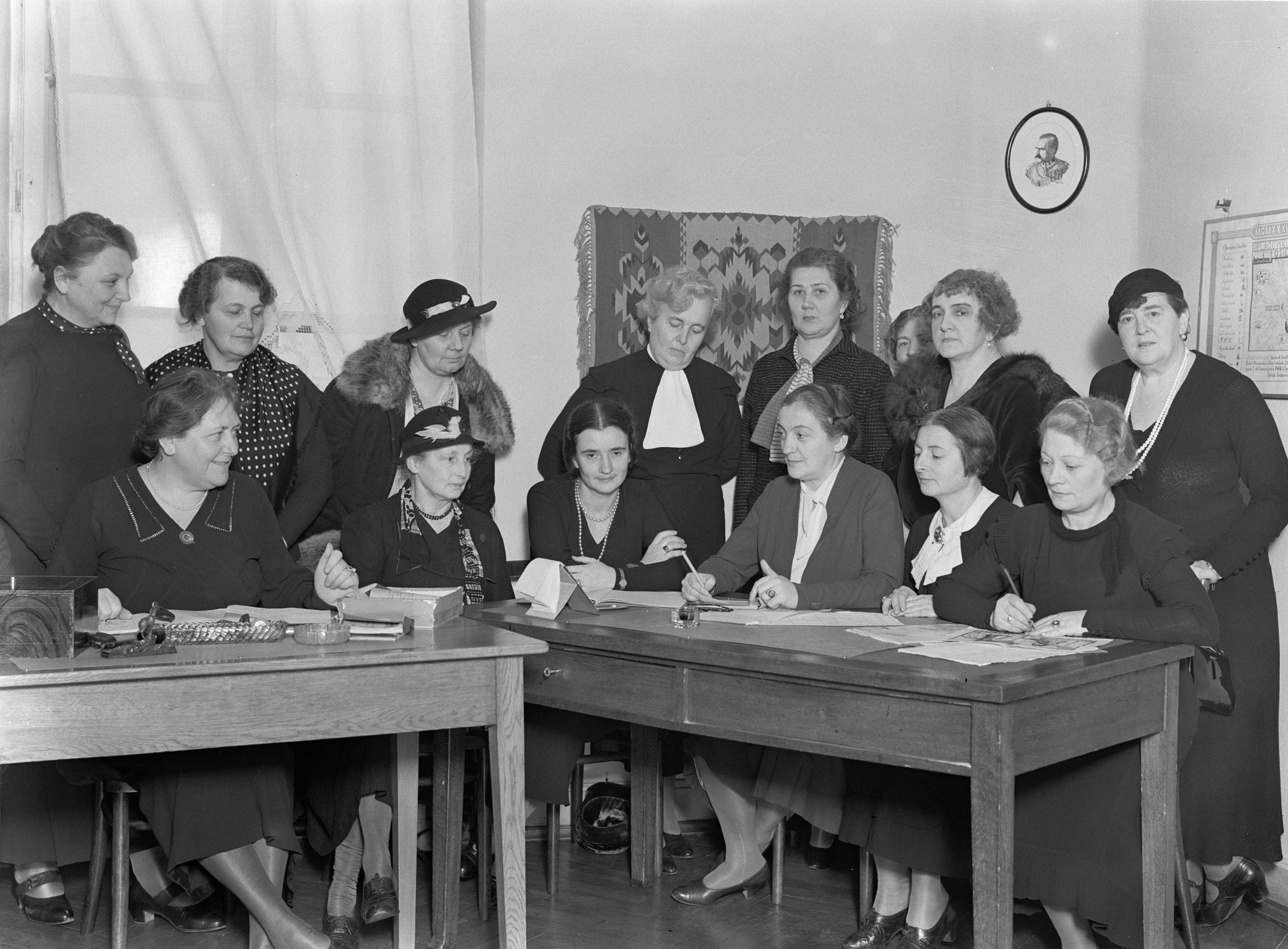 Collectie / Archief : Fotocollectie Van de Poll